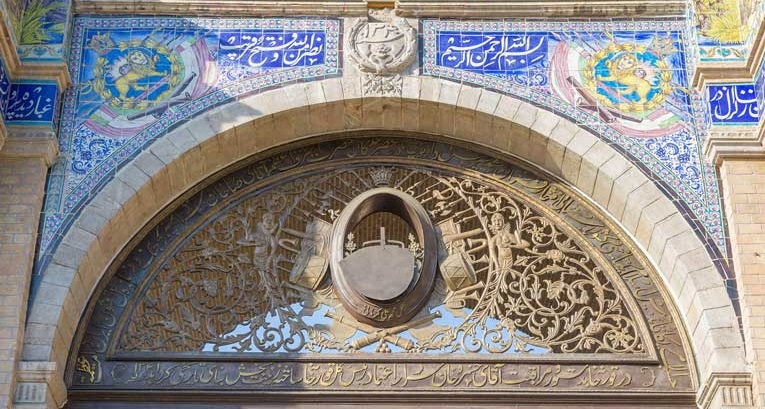 کتیبه برنزی سدر باغ ملی